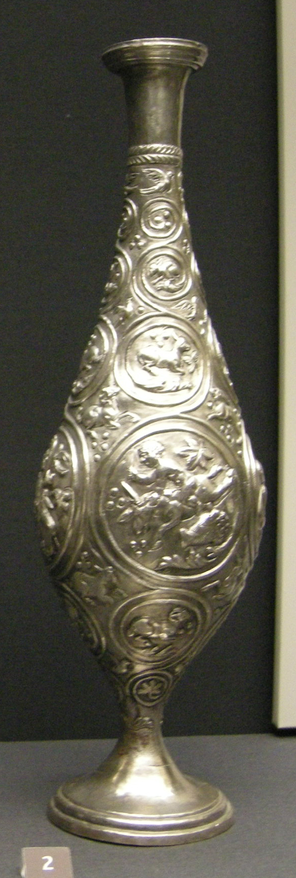 Bottiglia dal tesoro dell'Esquilino